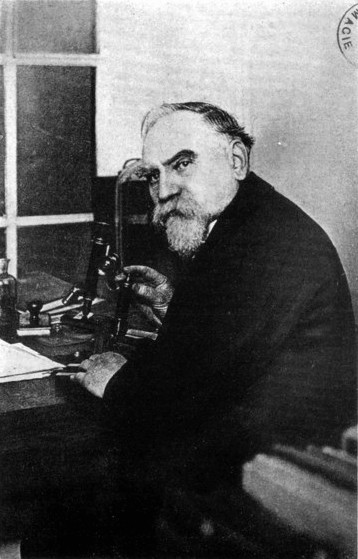 Élie-Émile Bourquelot dans son laboratoire